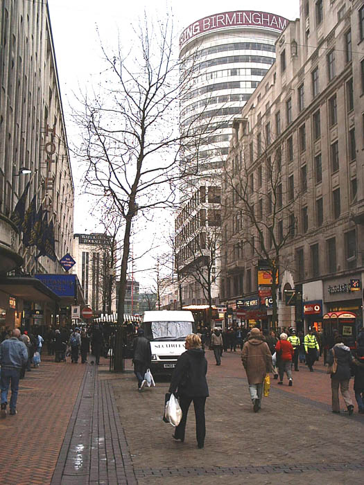 Die New Street, die Haupteinkaufsstraße von Birmingham, im Hintergrund das zylinderförmige Rotunda-Hochhaus (fotografiert im Januar 2004).